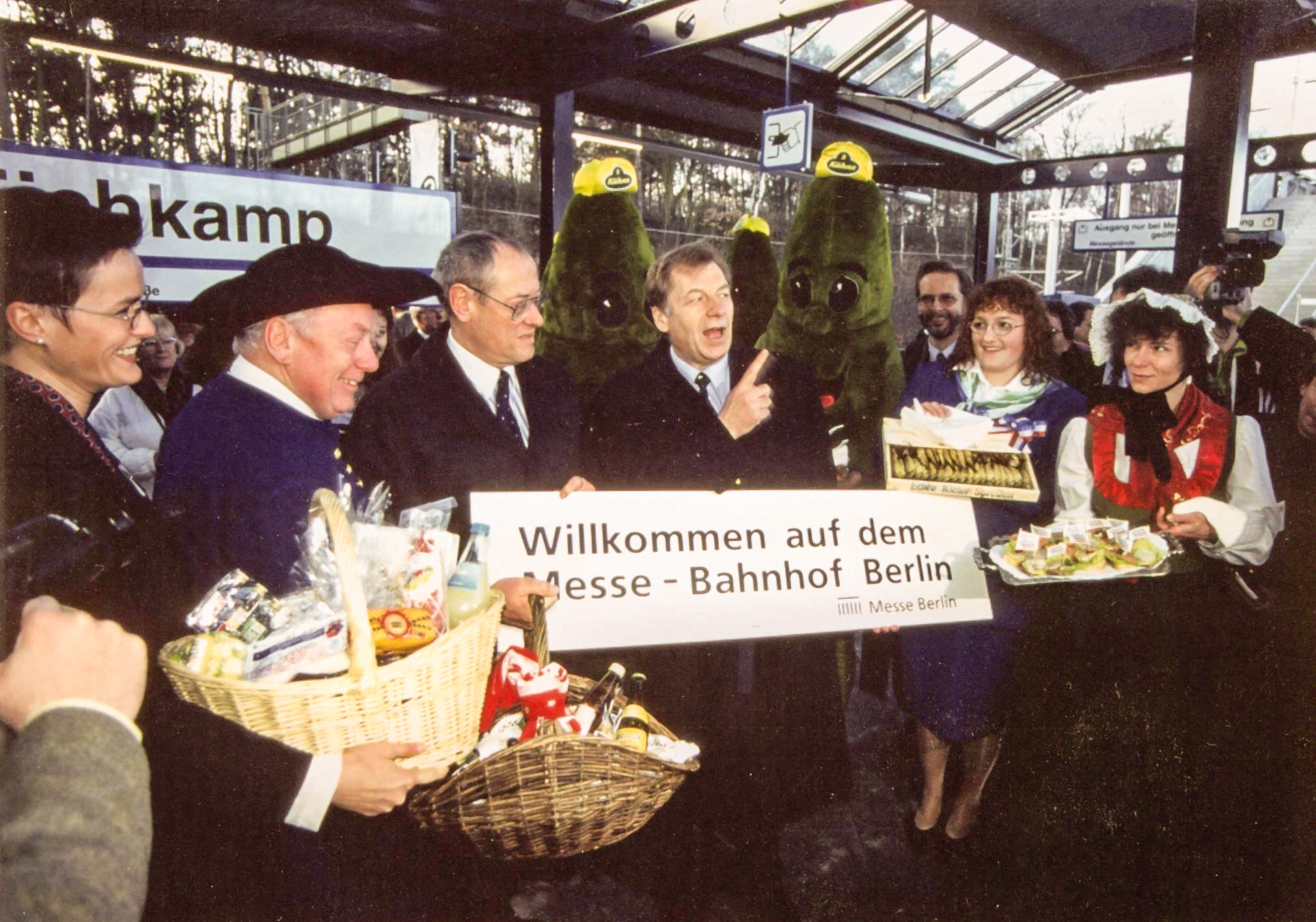 Wiedereröffnung der S-Bahn Berlin am Bahnhof Eichkamp (heute Messe Süd); mit erhobenem Zeigefinger: Eberhardt Diepgen